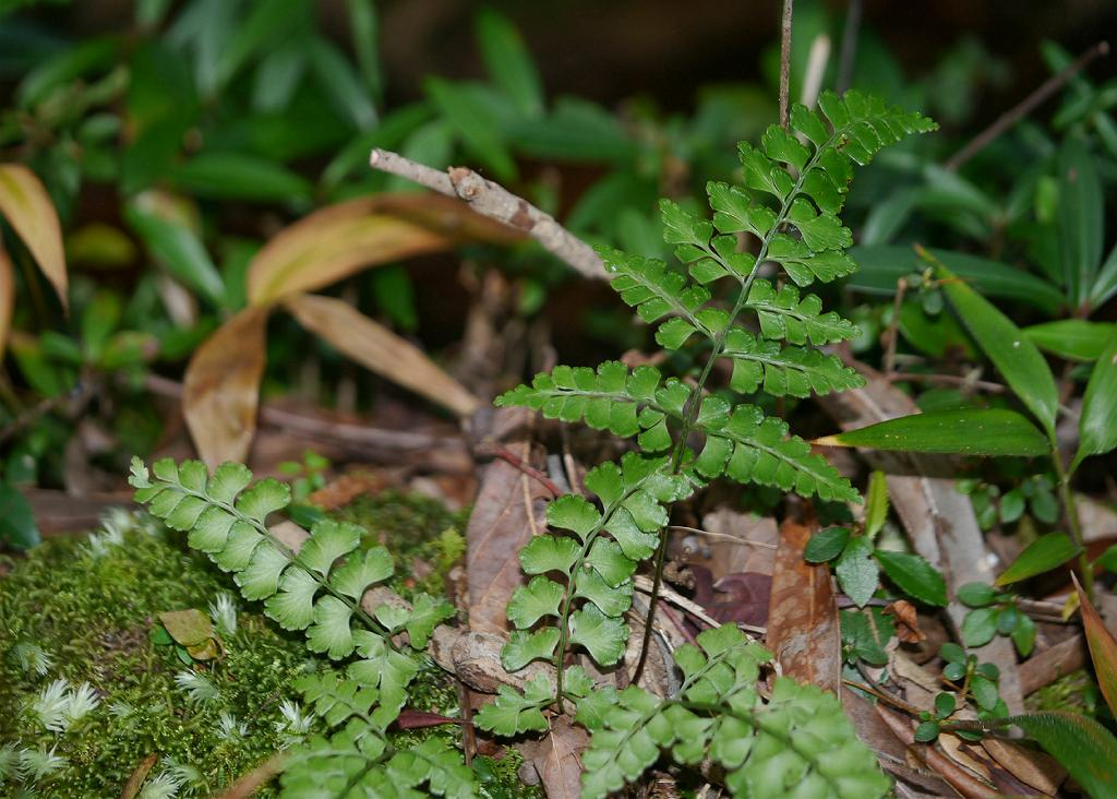 Lindsaea chienii：エダウチホングウシダ 2016/02/28 和歌山県田辺市：Tanabe City. Wakayama Pref. Japan